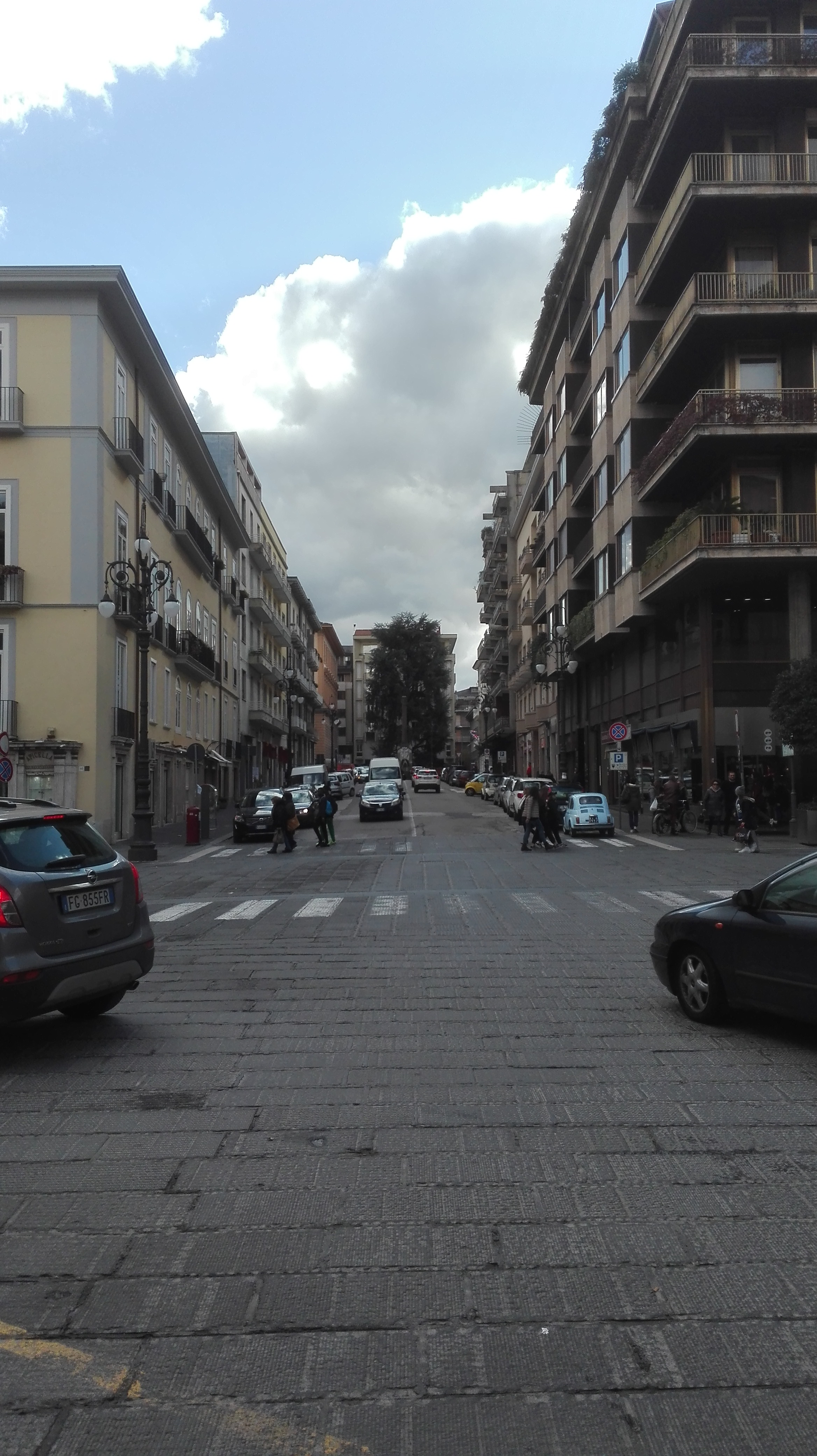 Vista della Via da Via Mancini. In fondo alla strada si scorge il monumento ai caduti